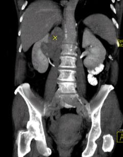 Koronare Rekonstruktionsaufnahme eines Mehrzeilenspiral-CT MSCT eines Nierentumors rechts (im Bild links, mit Kreuz markiert)